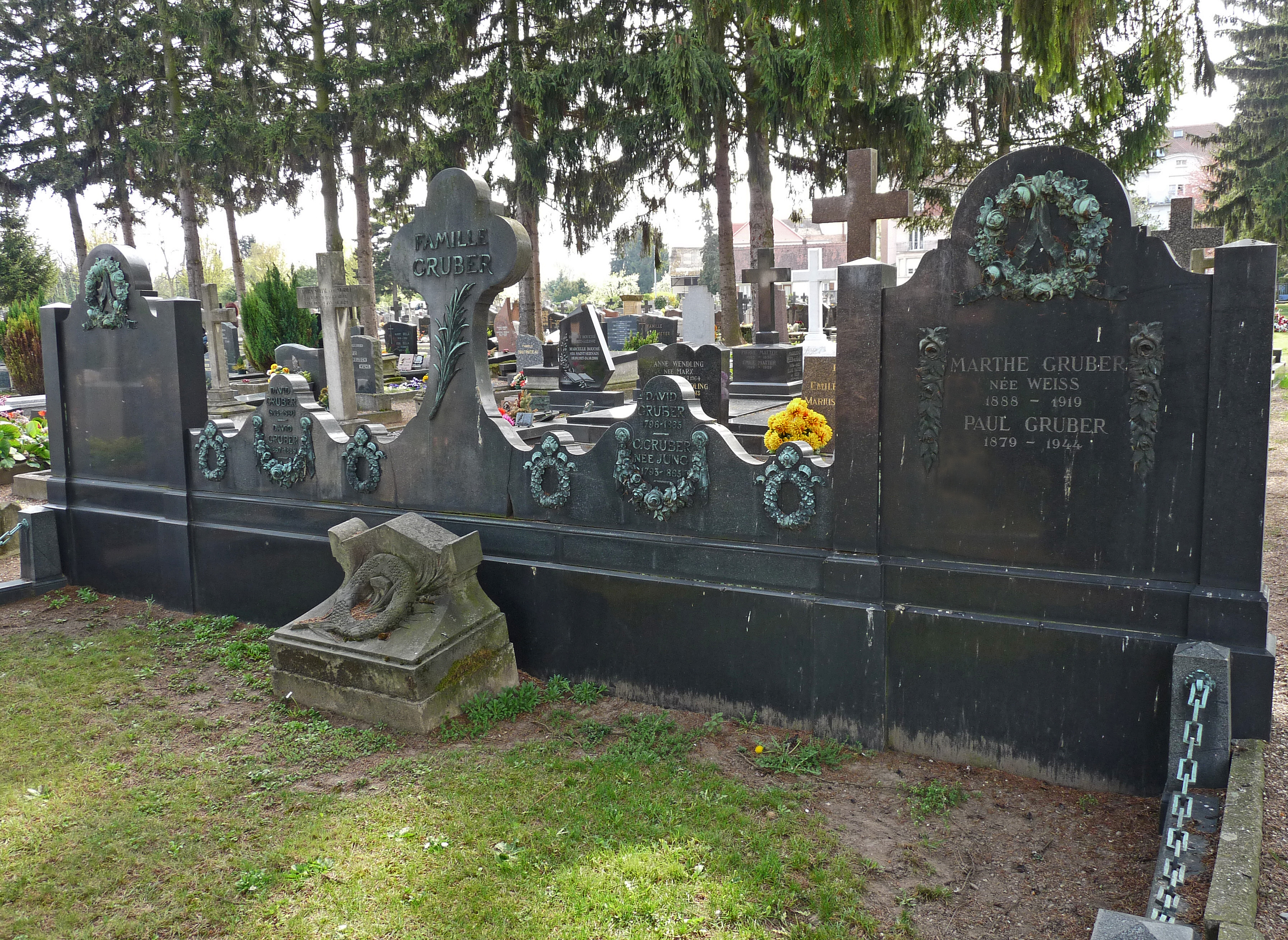 Sépultures de la famille Gruber, brasseurs alsaciens, au cimetière Saint-Gall de Koenigshoffen (Strasbourg).